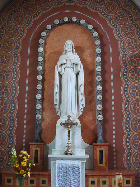 Interior da Igreja de São José, Porto Alegre, Brasil. Estátua do Sagrado Coração de Jesus por André Arjonas